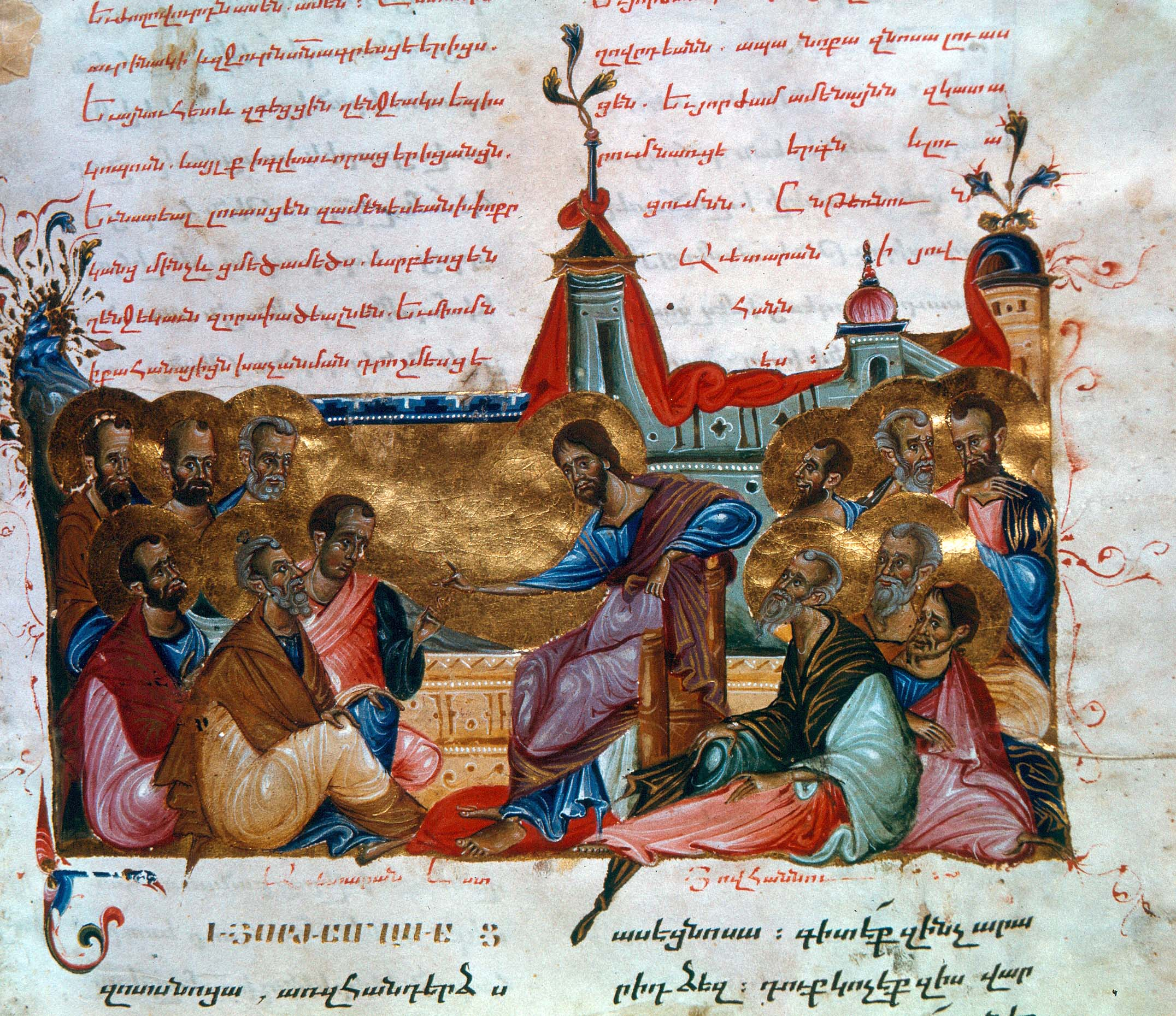 Հիսուս և տասներկու առաքյալներ, հայկական մանրանկար